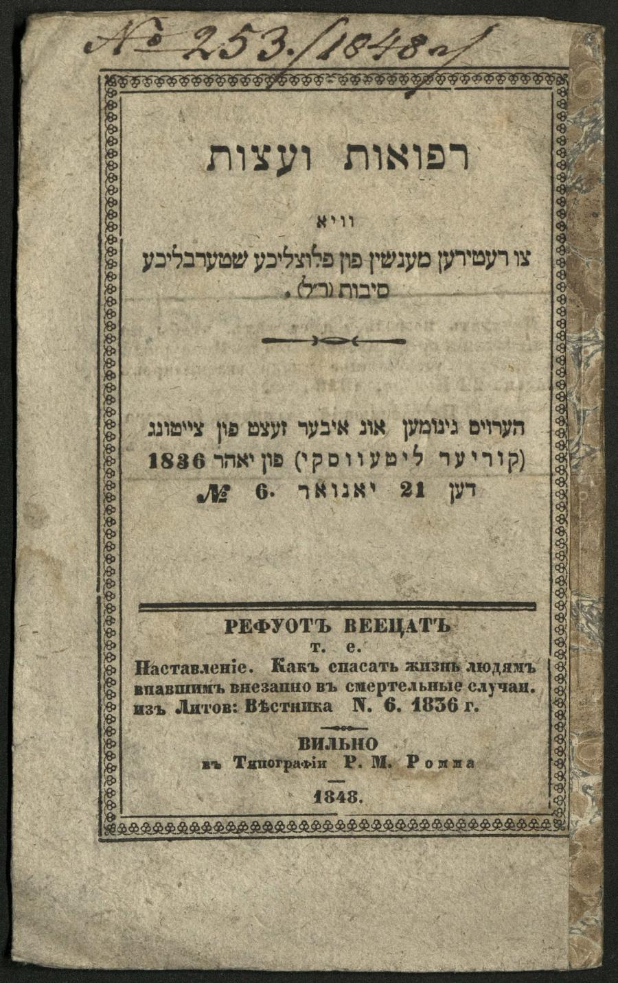 ספר 'רפואות ועצות' ביידיש, וילנה 1836 כיצד להציל אנשים ממוות